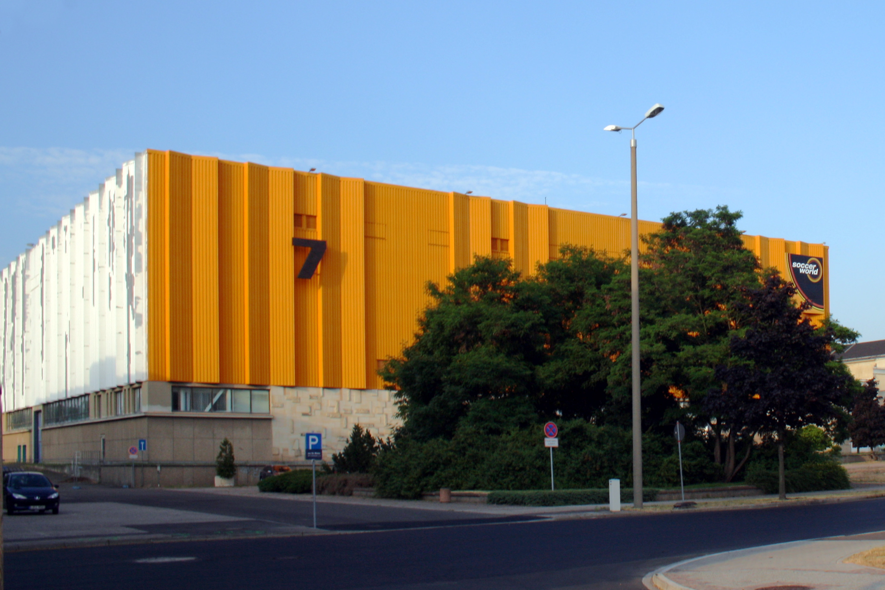 Messehalle 7 – Fußballhalle – alte Messe